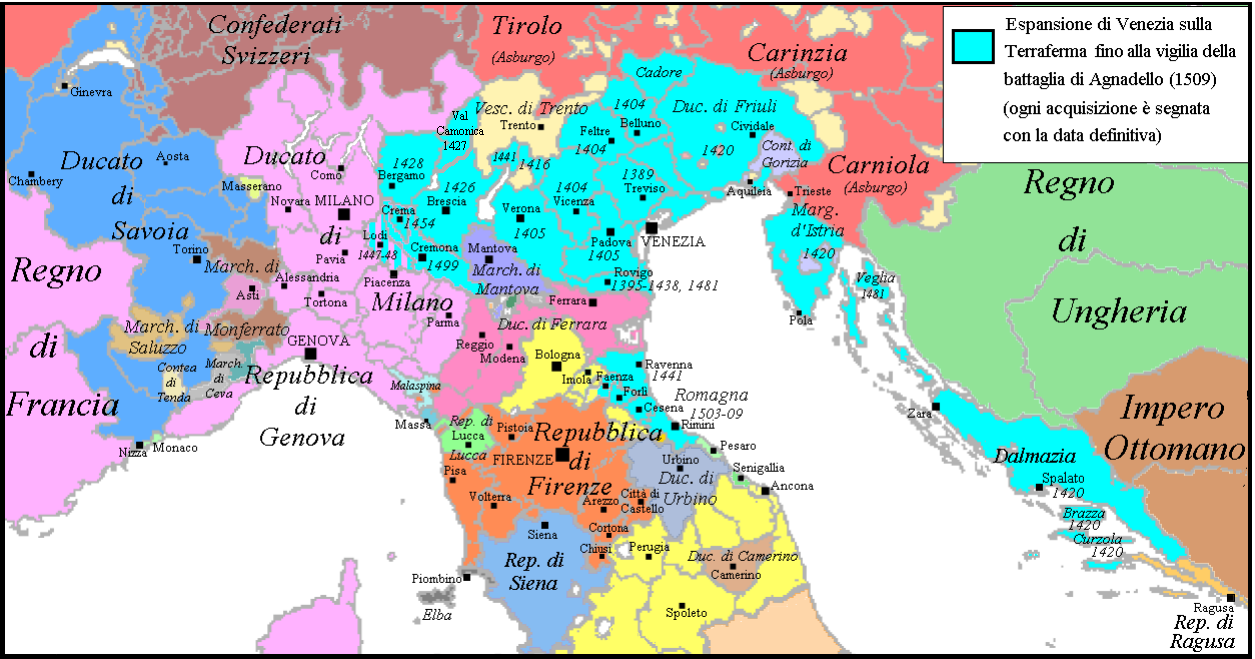 Expansión de la República de Venecia en la Terraferma